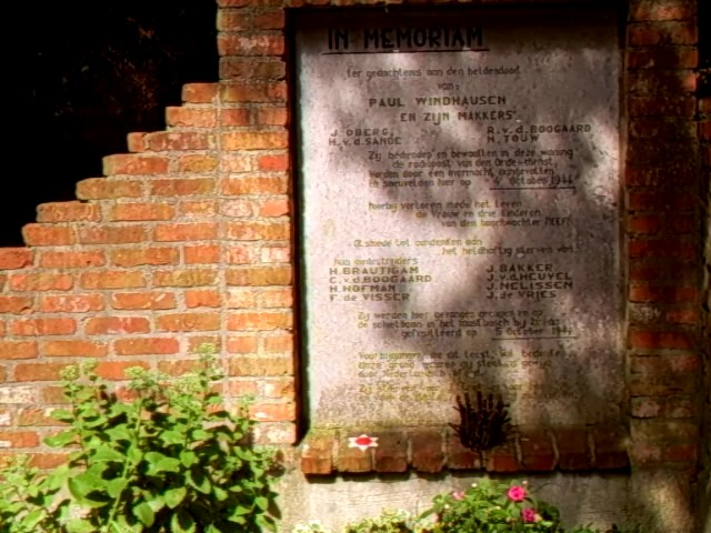 Vloeiweide monument aan de Hellegatseweg 6, in Rijsbergen. De foto behoort tot de privé-collectie van Ben Buunk (Breda). De foto is gemaakt op 29 juli 2009. De afbeelding betreft een monument ter nagedachtenis van Paul Windhausen en zijn makkers. Het monument werd op 8 oktober 1994 opgericht in de Vloeiweide, op de plaats waar de boswachterswoning van Neefs heeft gestaan en waar de verzetsstrijders op 4 oktober 1944 door de Duitsers werden gedood. Het "Vloeiweide monument" aan de Hellegatseweg 6, in Rijsbergen, bestaat uit de restanten van het fundament van een woning, waarvoor een bakstenen gedenkmuur met een natuurstenen plaquette is aangebracht.